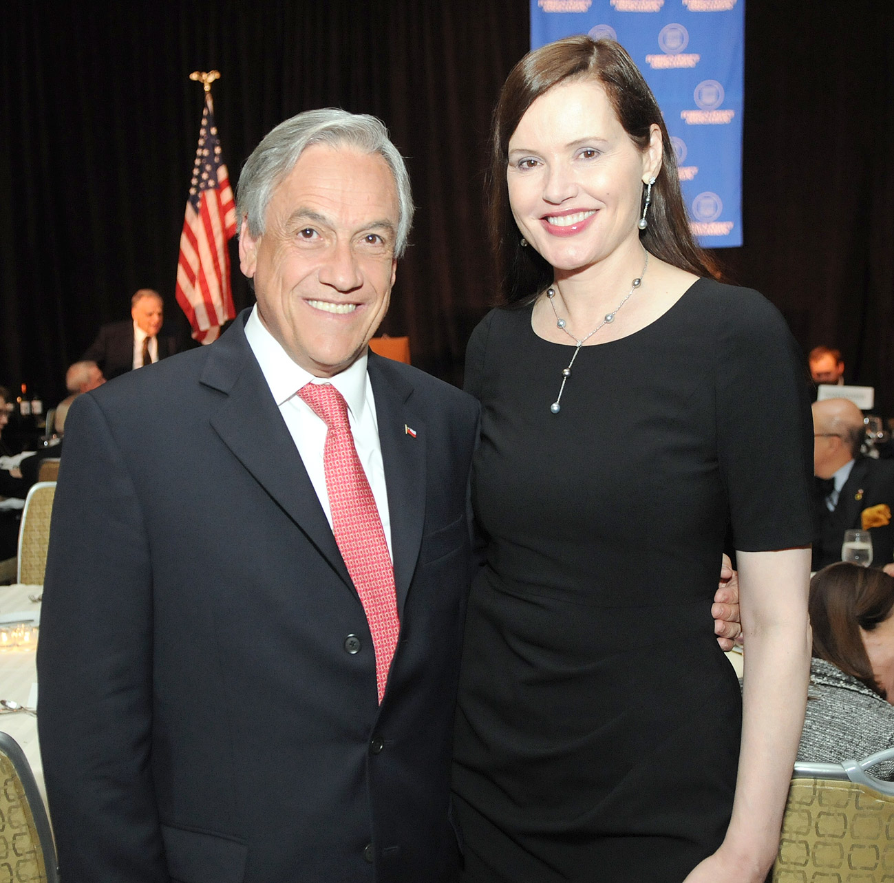 El Presidente de la República, Sebastián Piñera, participa en cena ofrecida por la Foreign Policy Association. En la foto Sebastian Piñera con Geena Davis.